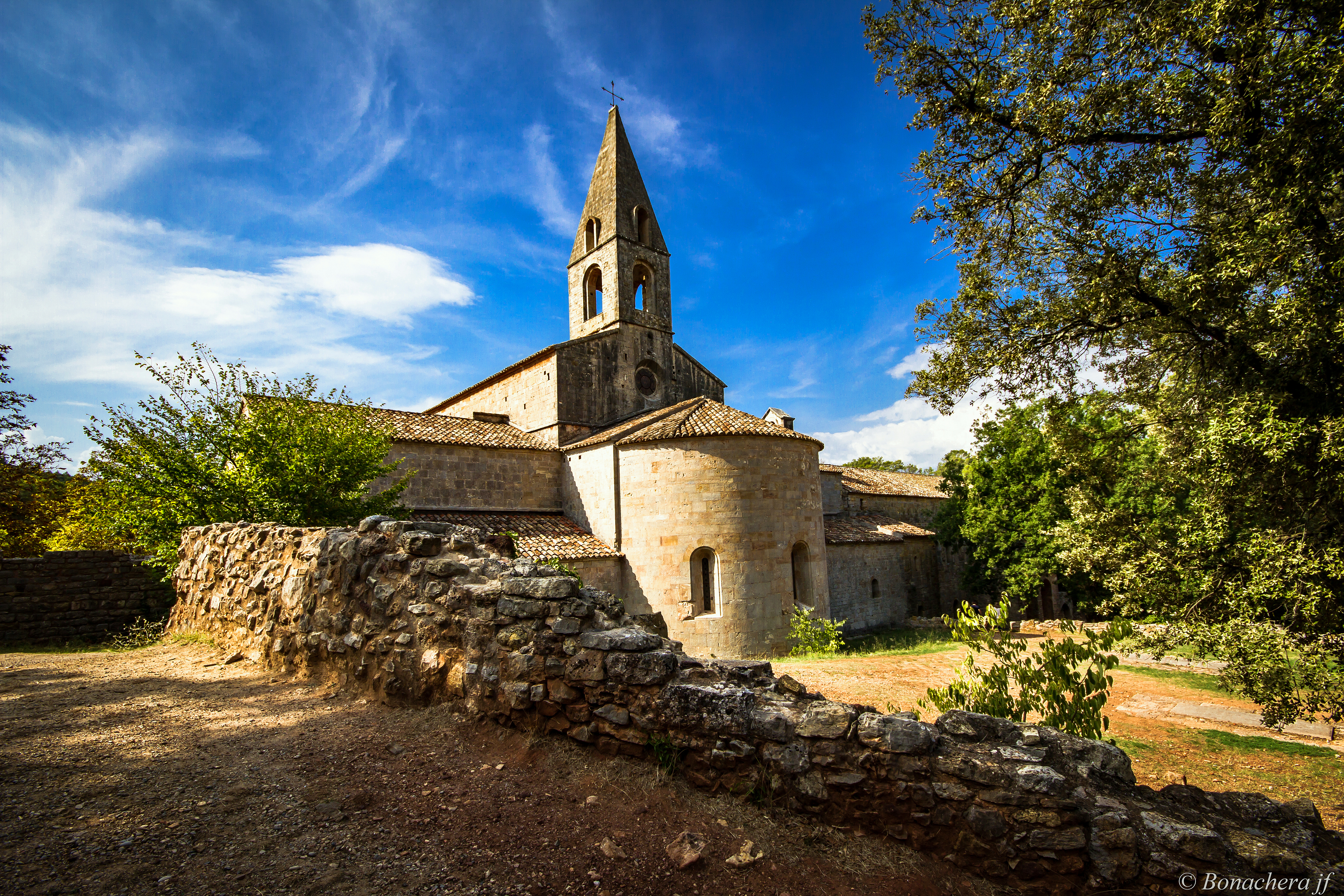 Le clocher, l'abside et le cimetiere